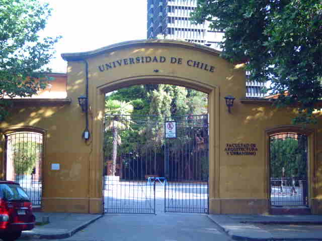 University of Chile Arquitecture Faculty (Facultad de Arquitectura de la Universidad de Chile)